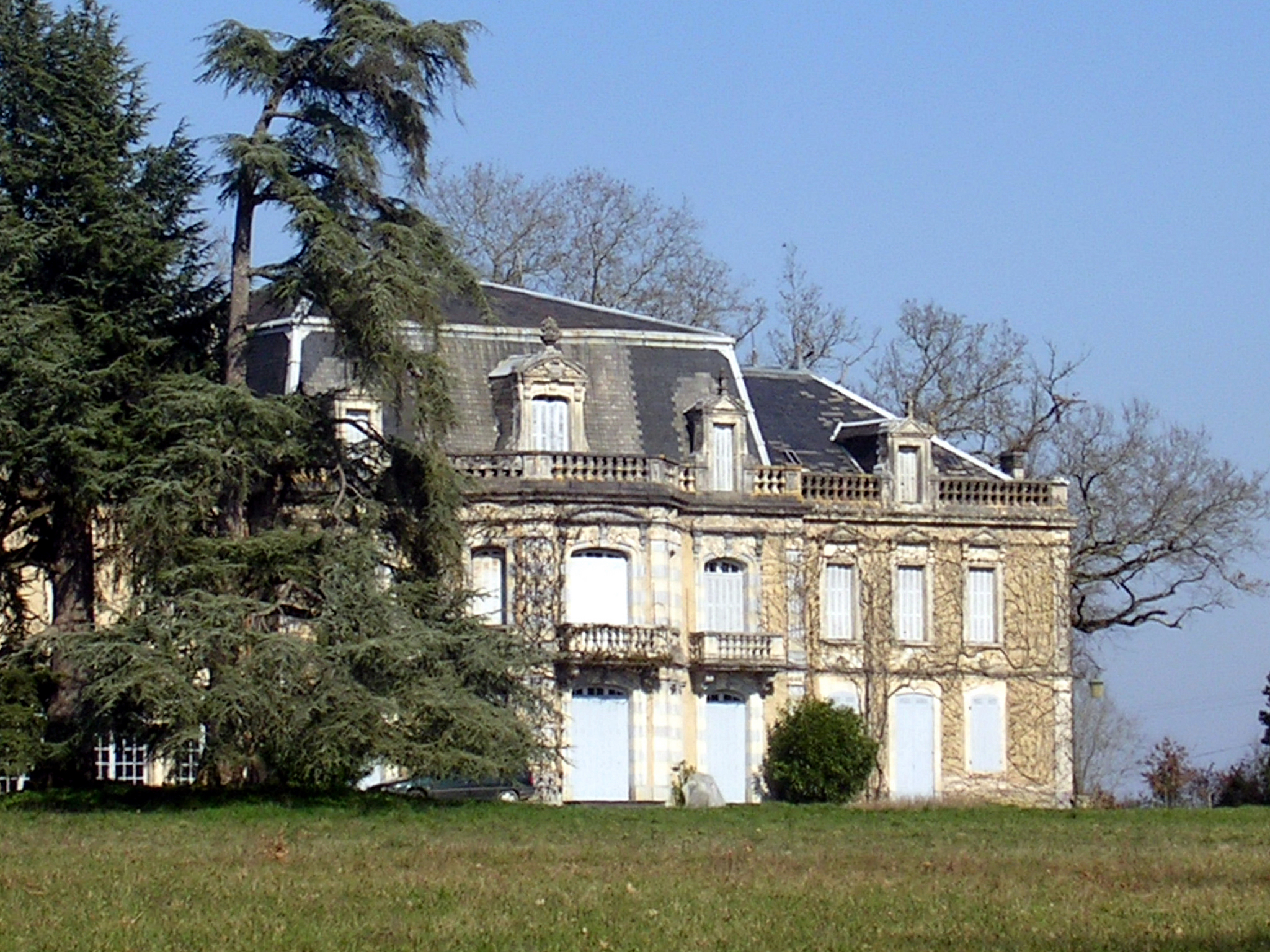 Château de Castandet, dans le département français des Landes. Oeuvre de l'architecte Jean-Marie Lacrampe .